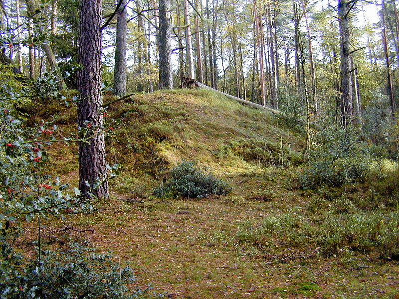 Ehrhorner Dünen (Lüneburger Heide)